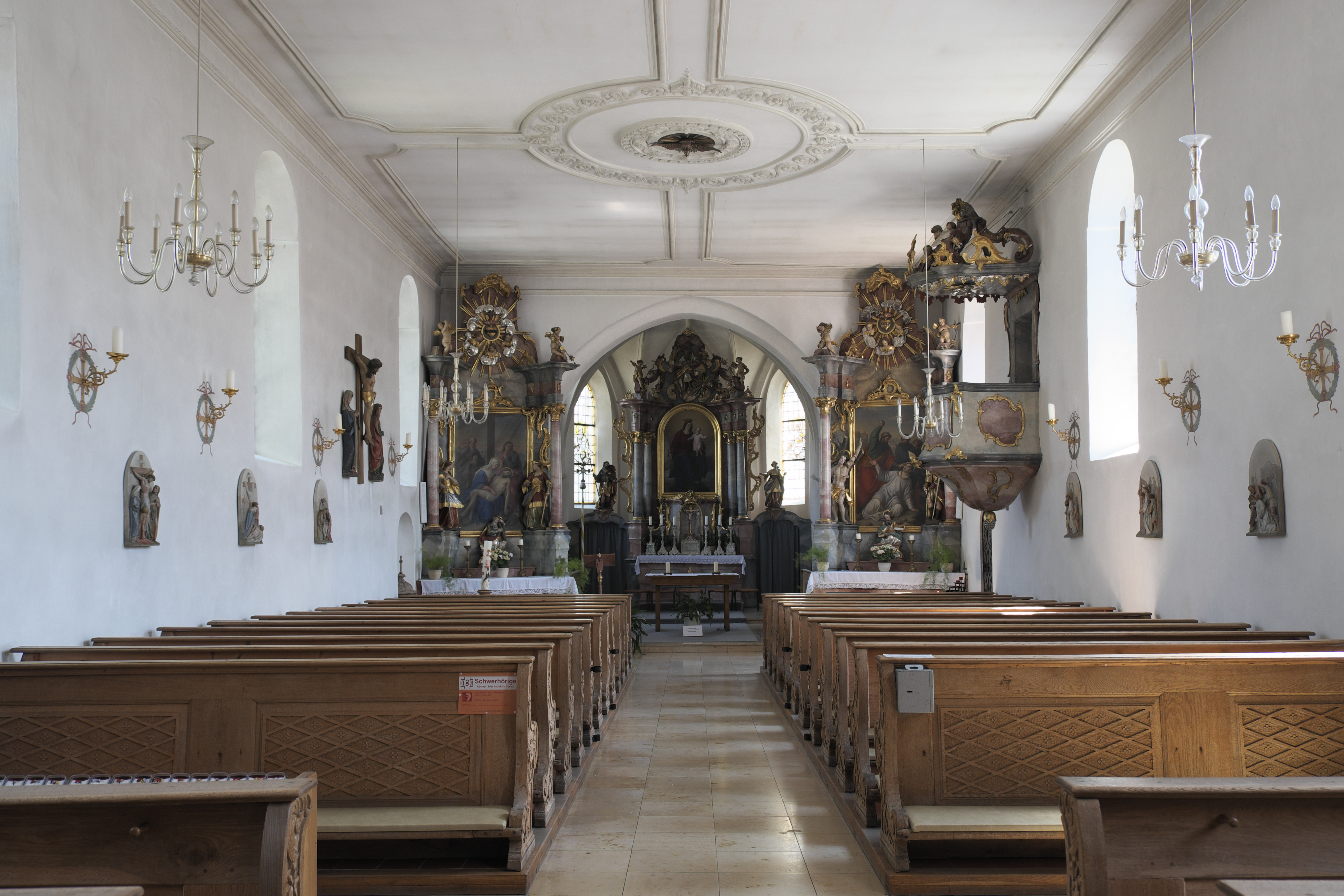 Katholische Pfarrkirche St. Jakob in Unterpfaffenhofen (Germering) im Landkreis Fürstenfeldbruck (Bayern/Deutschland), Innenraum